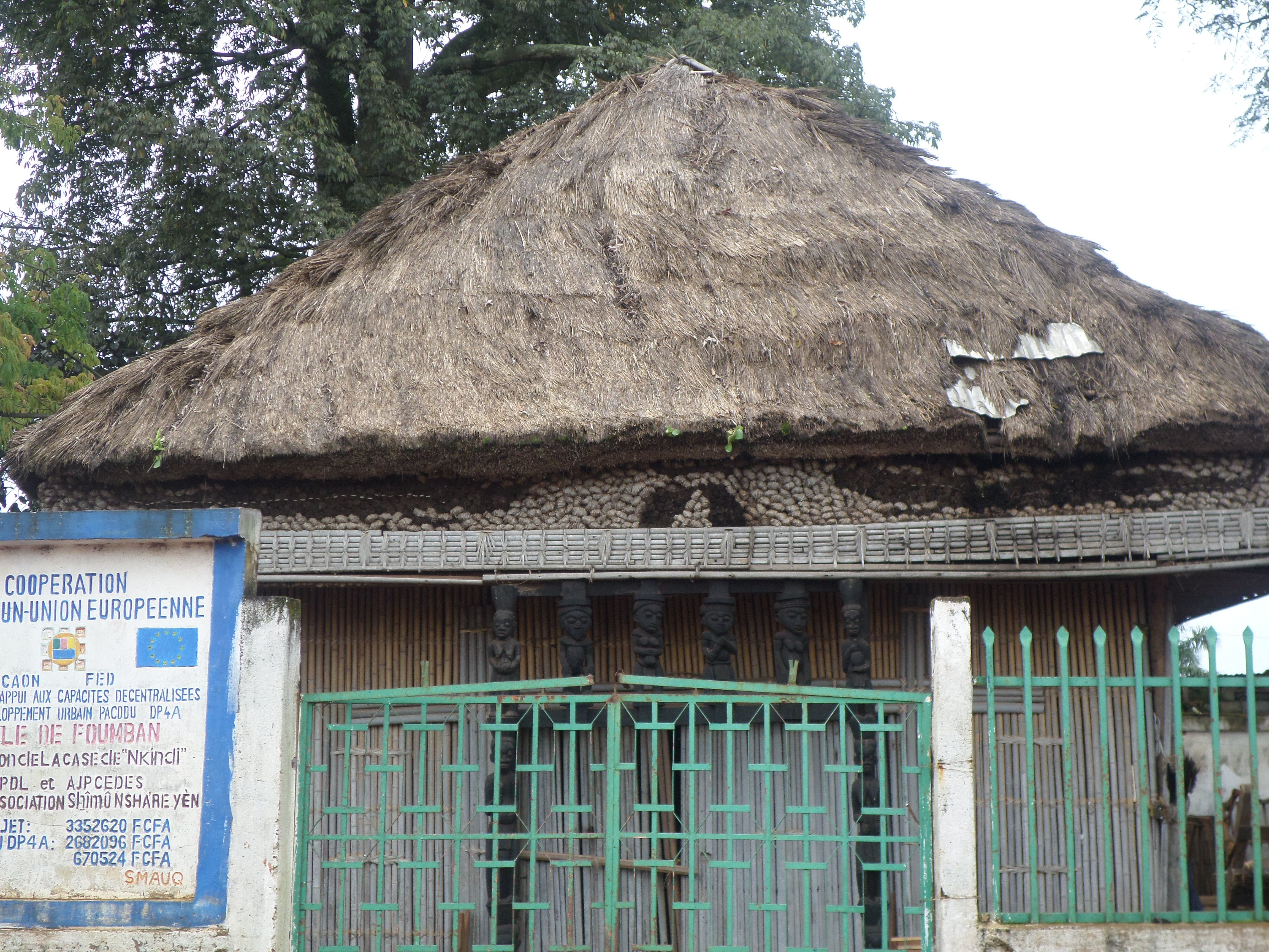 Case tamtam